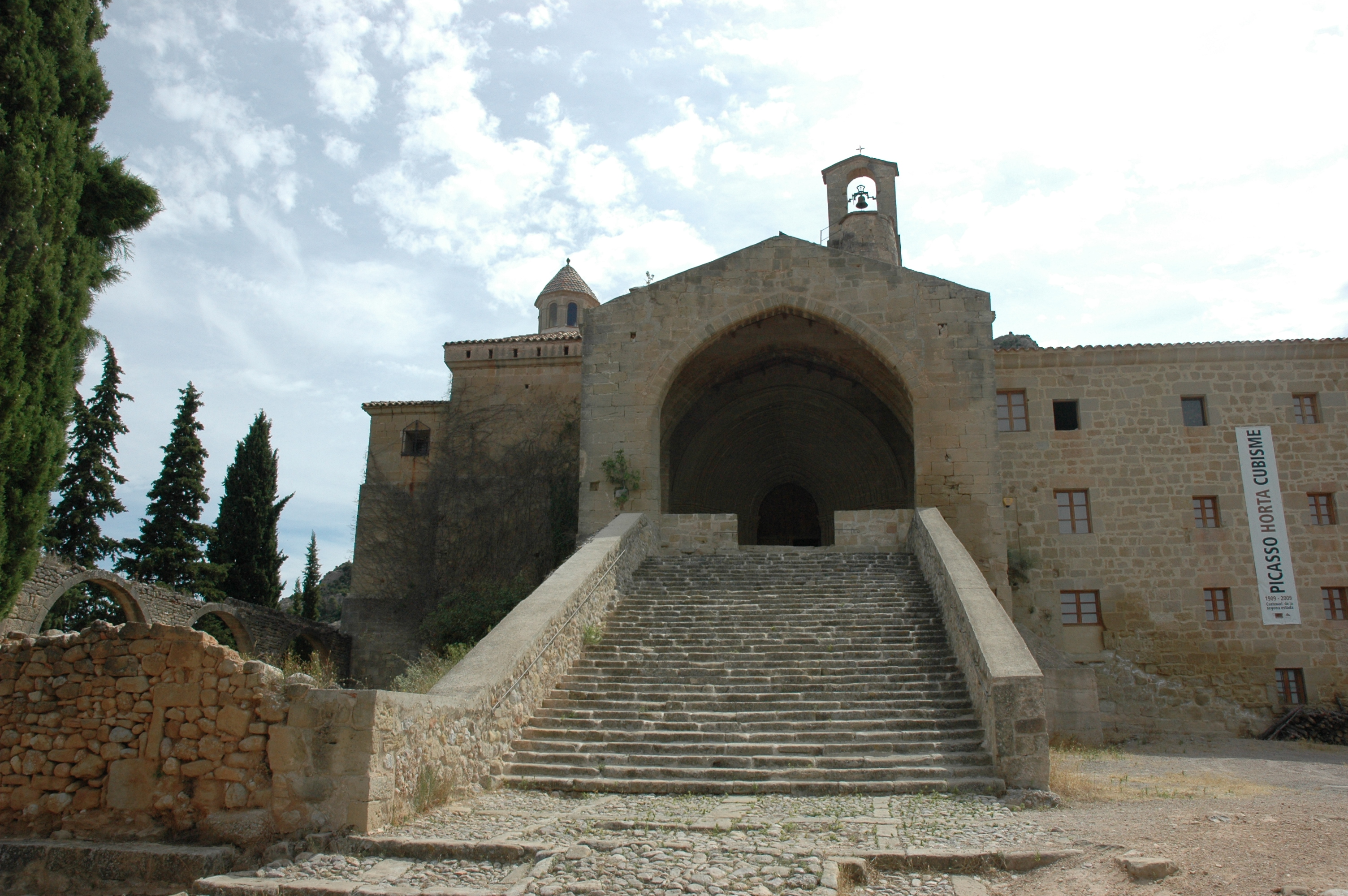 Convent de Sant Salvador d'Horta - General